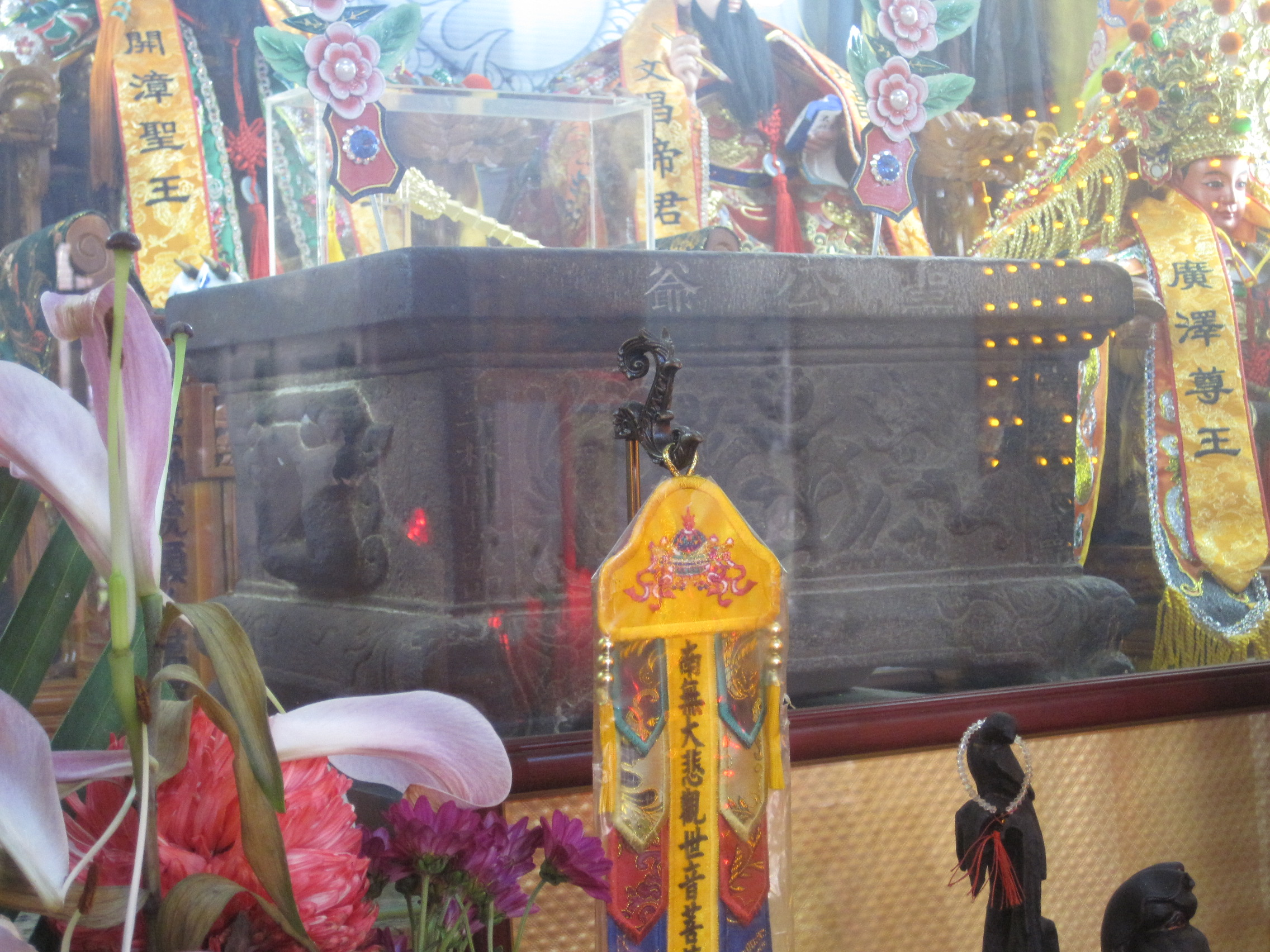 八協境聖公廟古香爐